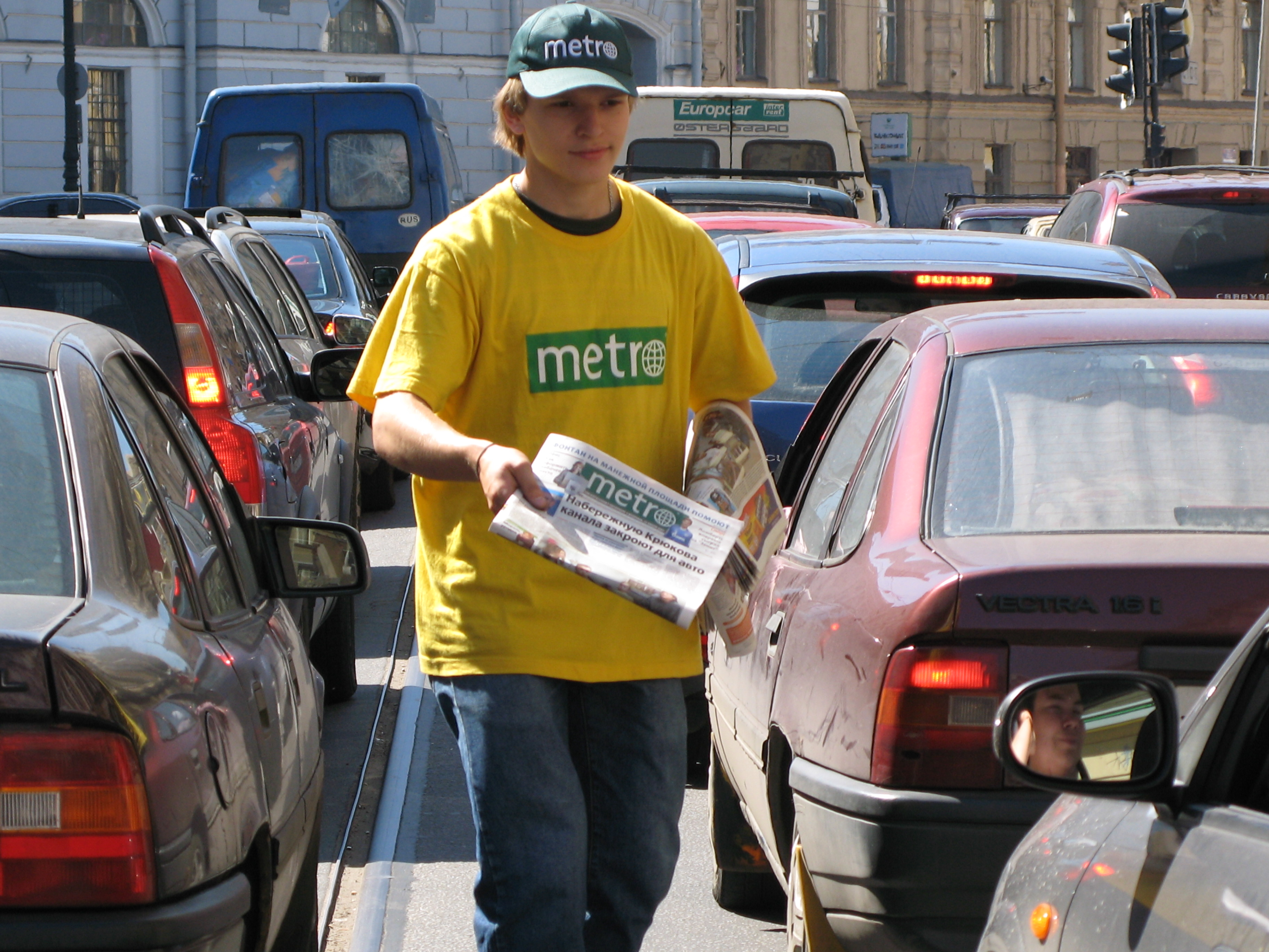 Распространение газеты Metro в пробке на Садовой улице Санкт-Петербурга летом 2007 года